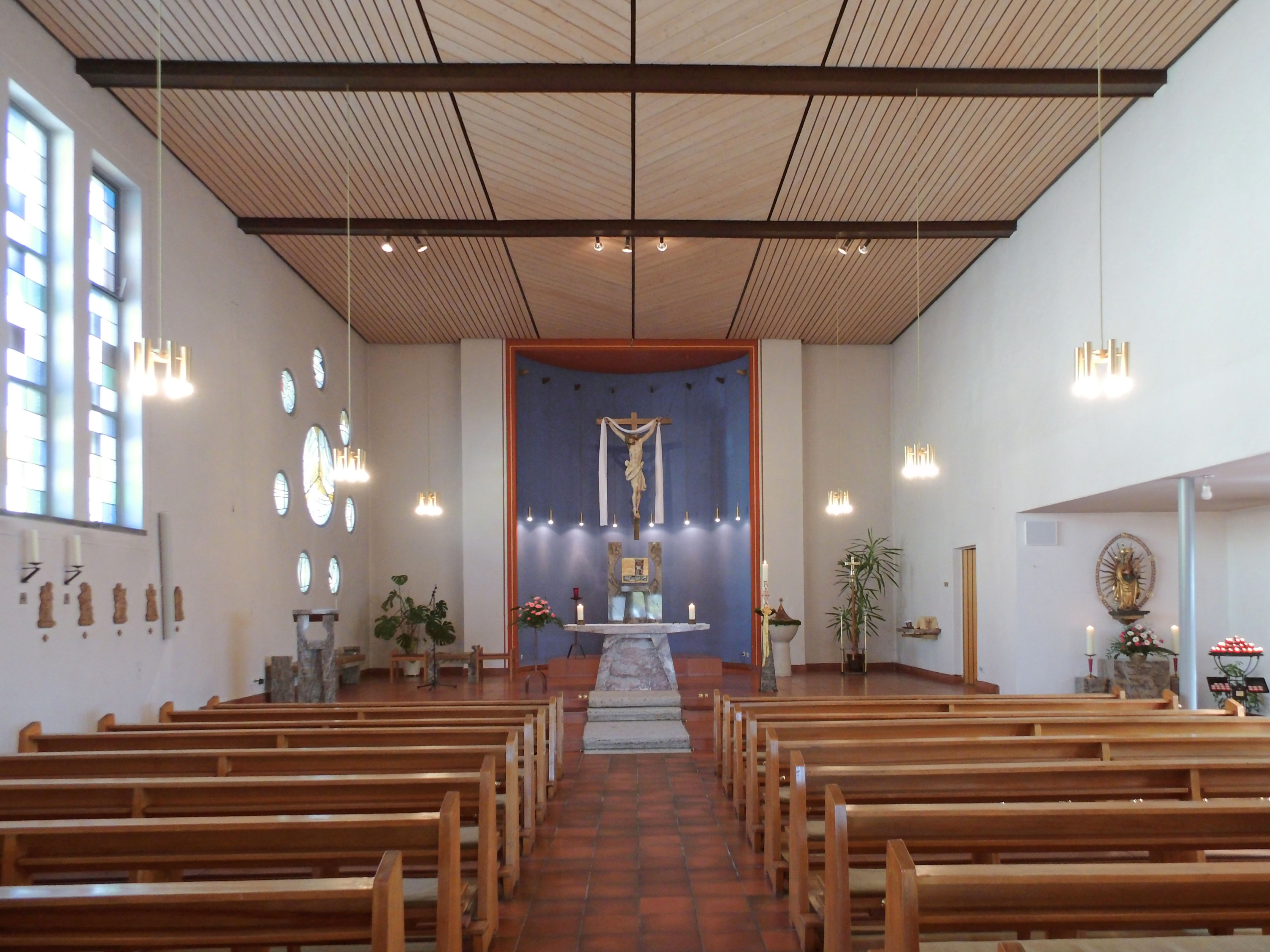 Katholische St.-Hedwig-Kirche in Braunschweig, Stadtteil Rüningen.